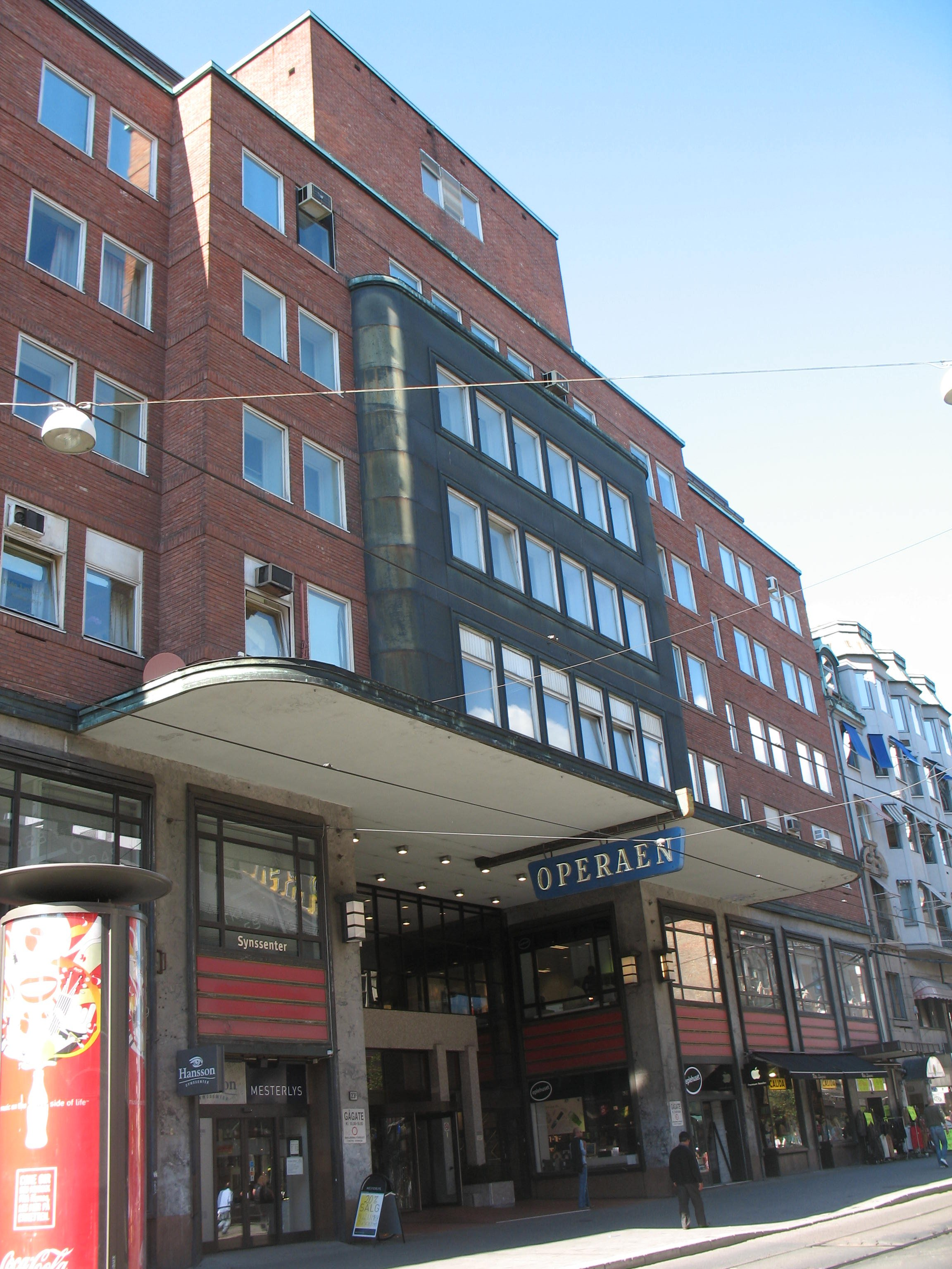 Den Norske Operas tilholdssted, Folketeateret i Oslo.